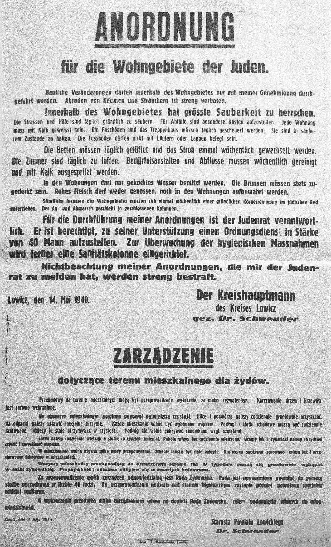 Zarządzenie w sprawie terenu mieszkalnego dla Żydów w Łowiczu